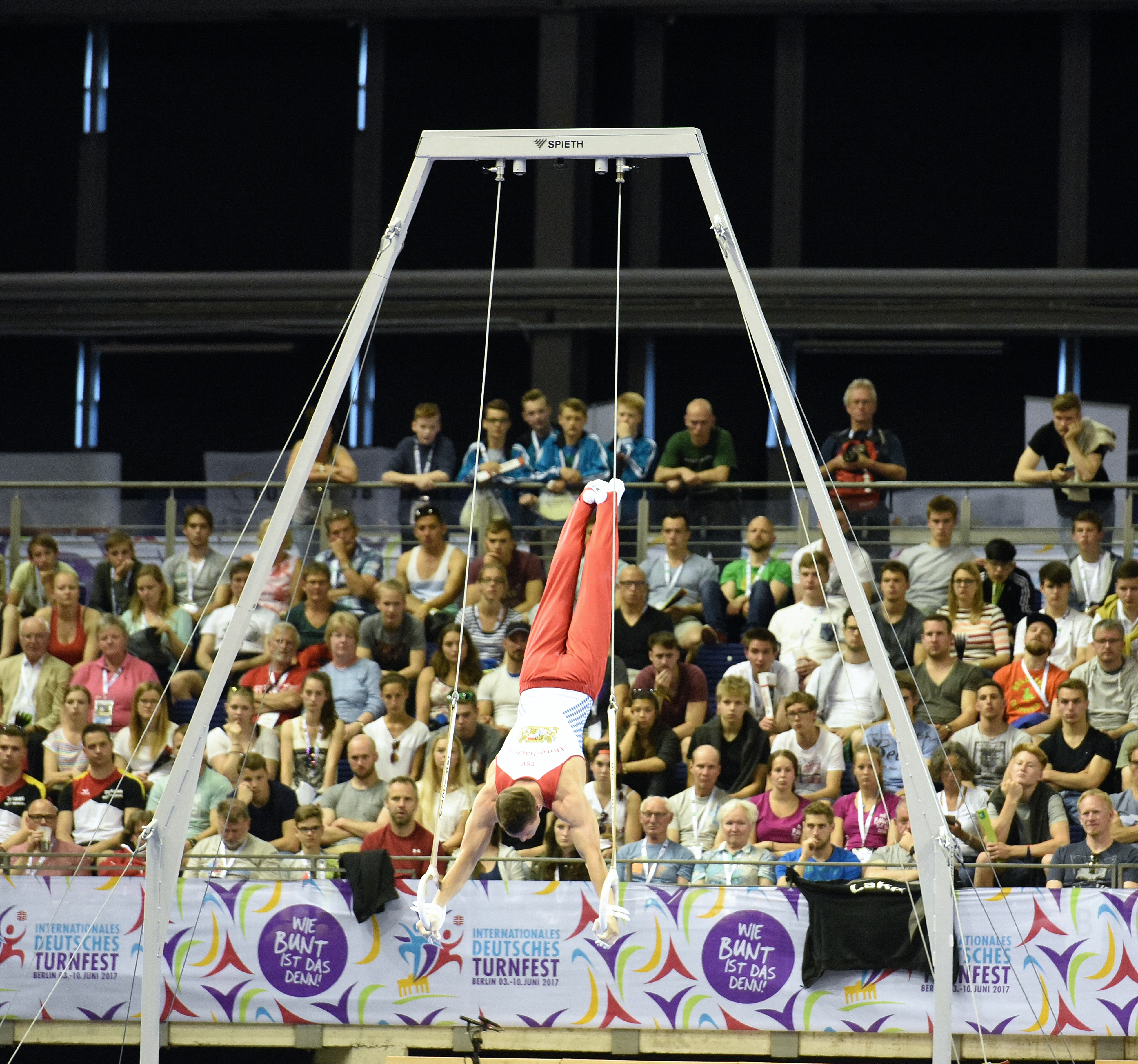 Deutsche Meisterschaften Gerätturnen Mehrkampf männlich Wettkampf beim Internationalen Deutschen Turnfest Berlin 2017. Abgebildet: Lukas Dauser.